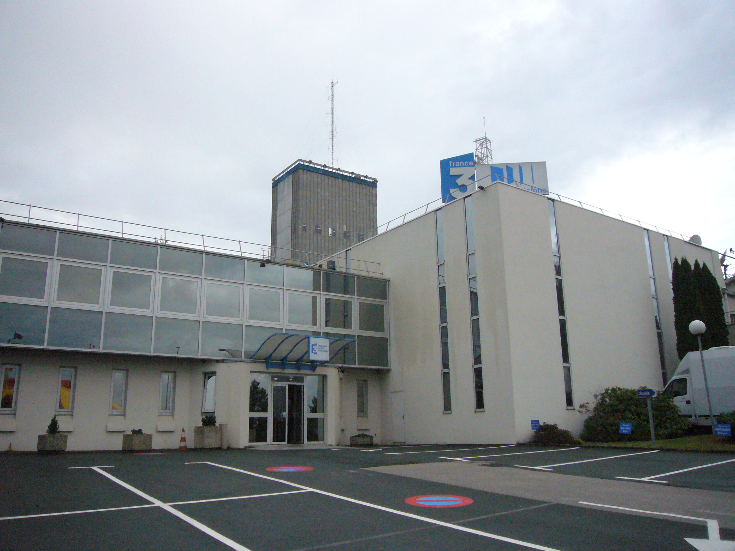 Siège régional de France 3 Limousin Poitou-Charentes à Limoges, Haute-Vienne, France (durant les journées du Patrimoine)